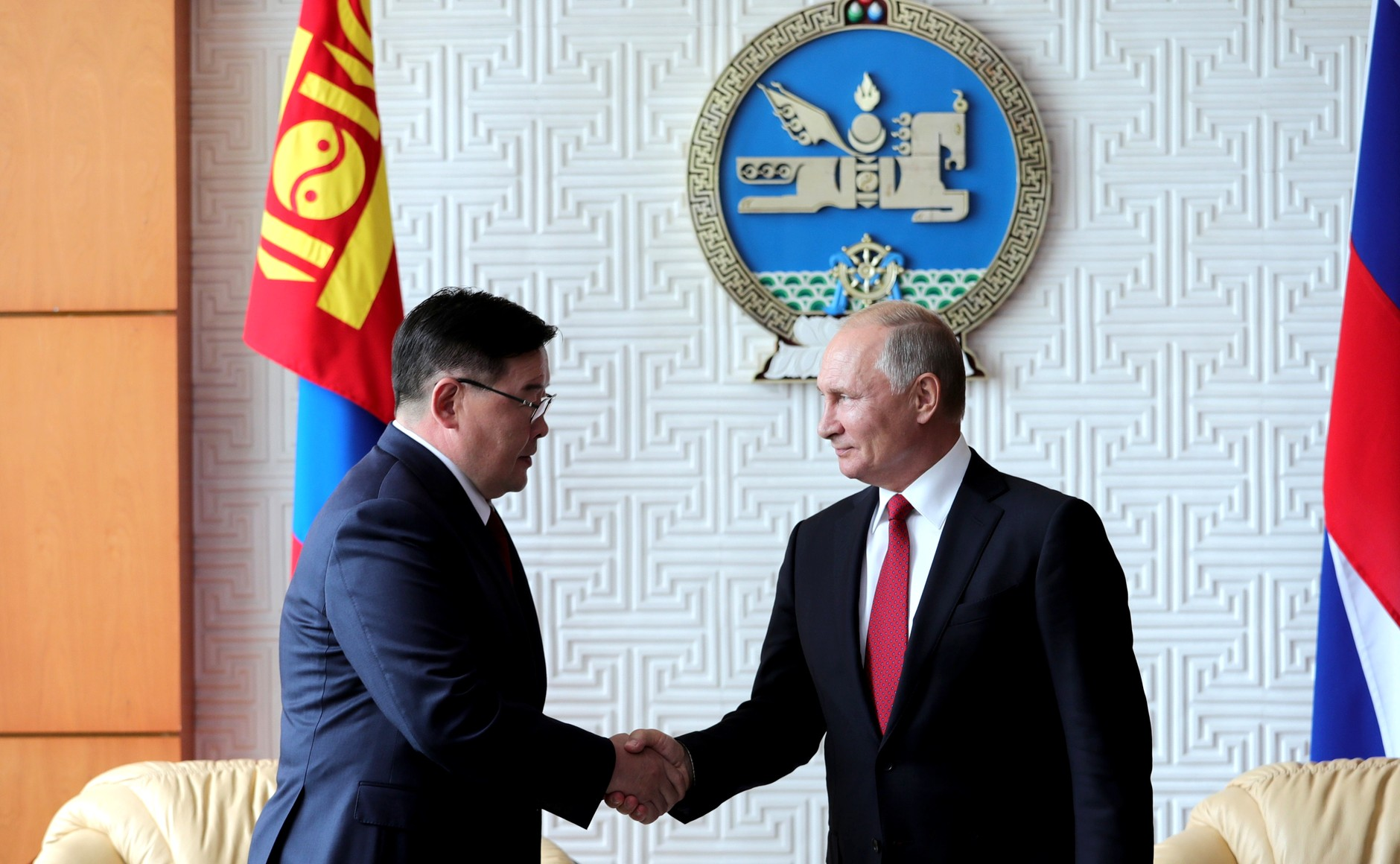 Президент России Владимир Путин с председателем Великого государственного хурала Монголии Гомбожавын Занданшатаром